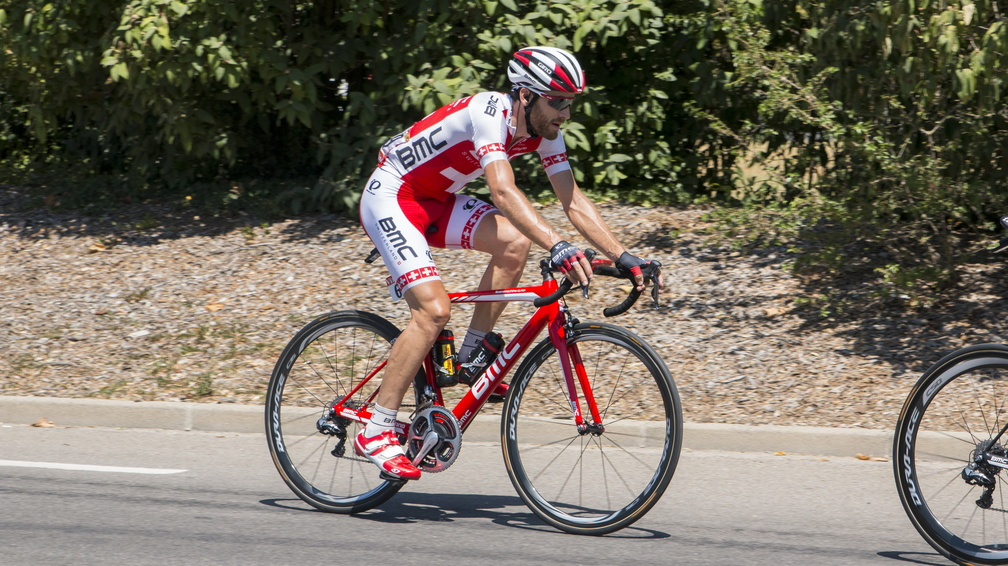 Danilo Wyss durant la traversée de Montélier lors du Tour de France 2015